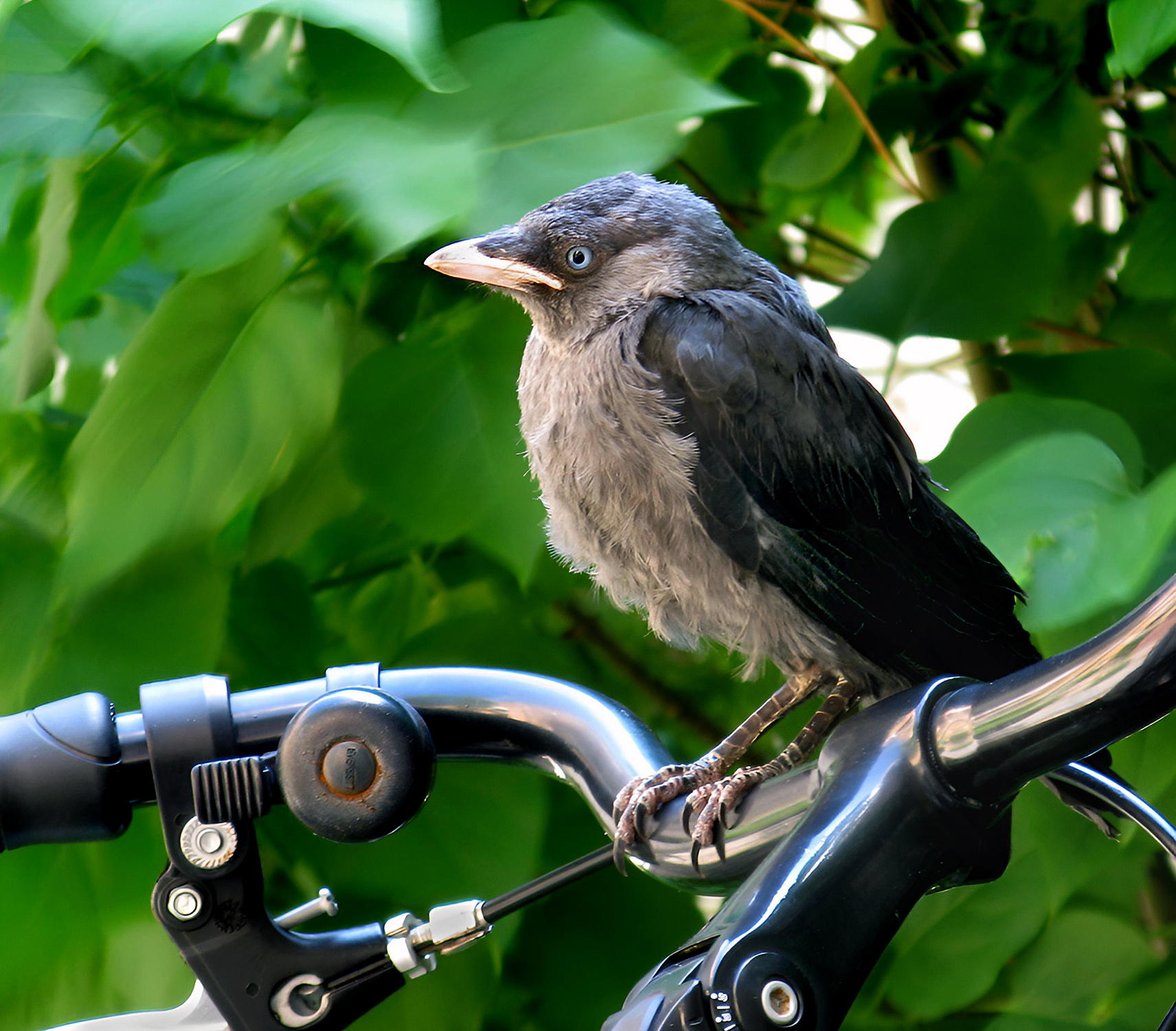 Kaja - Corvus monedula, ca 40 dagar gammal. Ystad 2011.